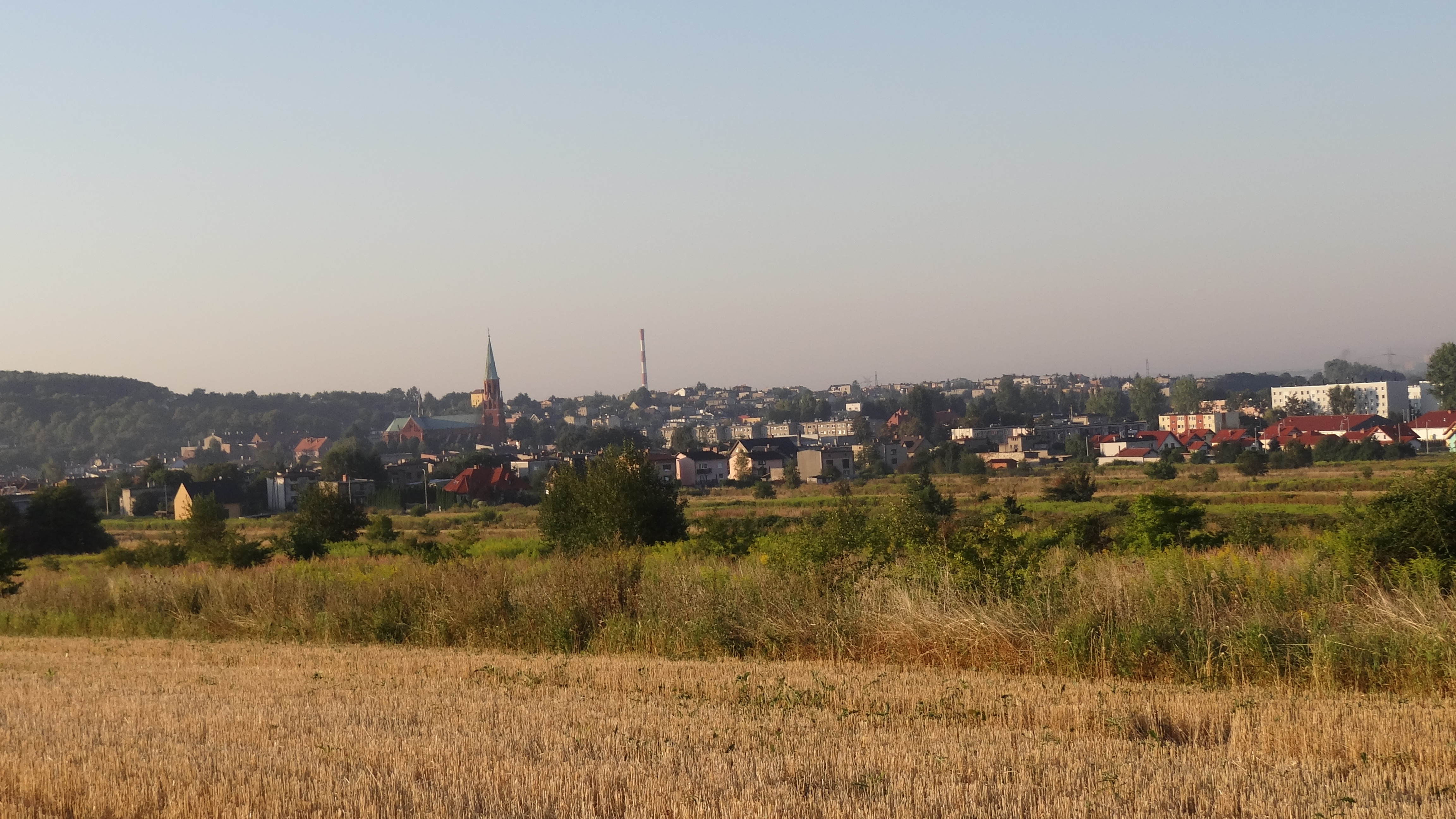 Ciekawe otaczające nas widoki.